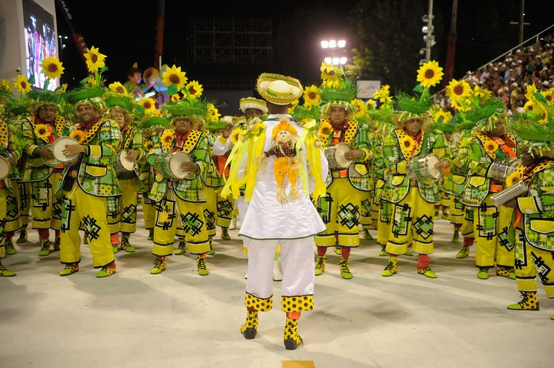 Imperatriz Leopoldinense abre o Desfile das Campeãs no Rio (Tomaz Silva/Agência Brasil)